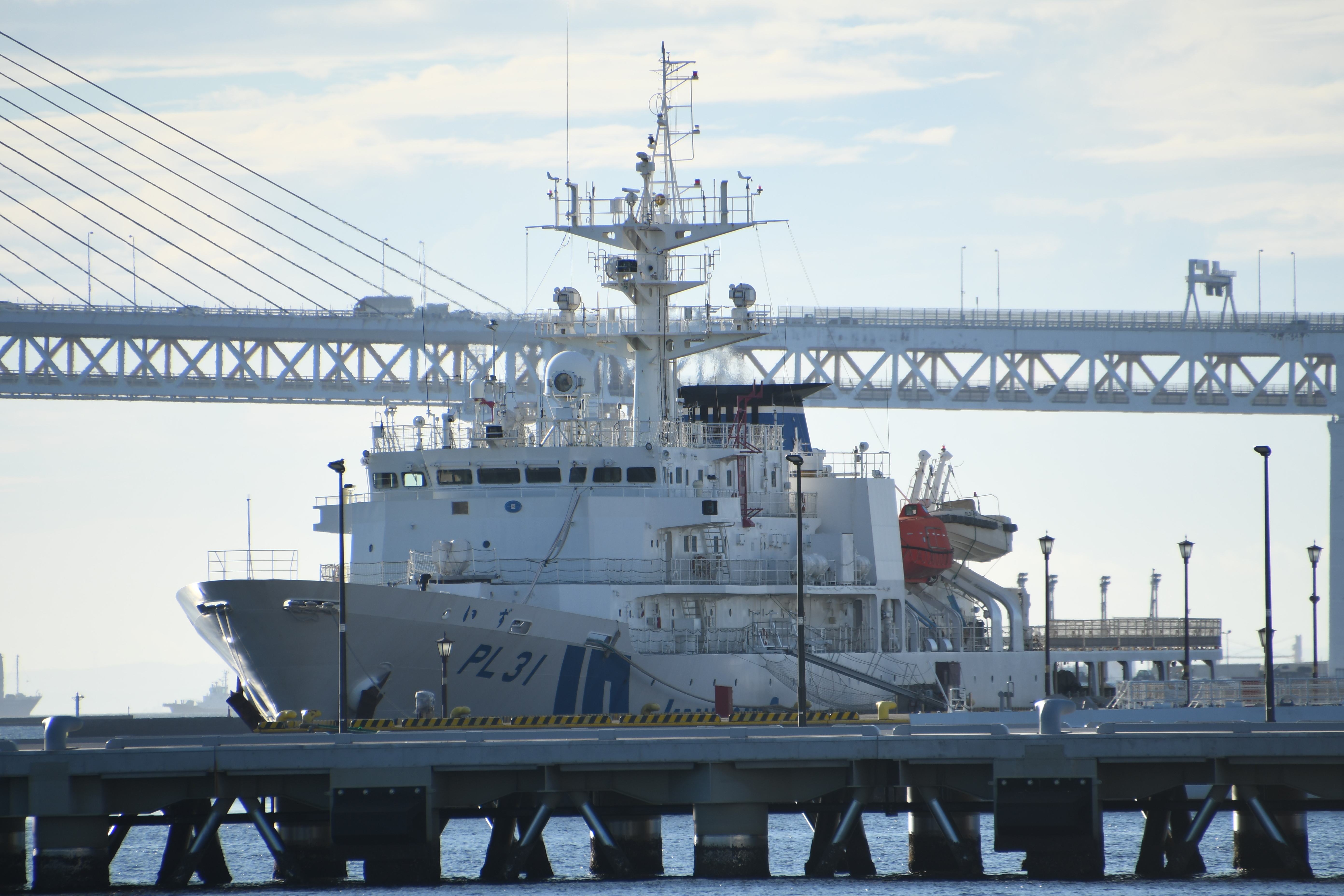 海上保安庁 3,500トン型巡視船いず（PL-31） 左舷前面。2019年7月26日 横浜港にて。